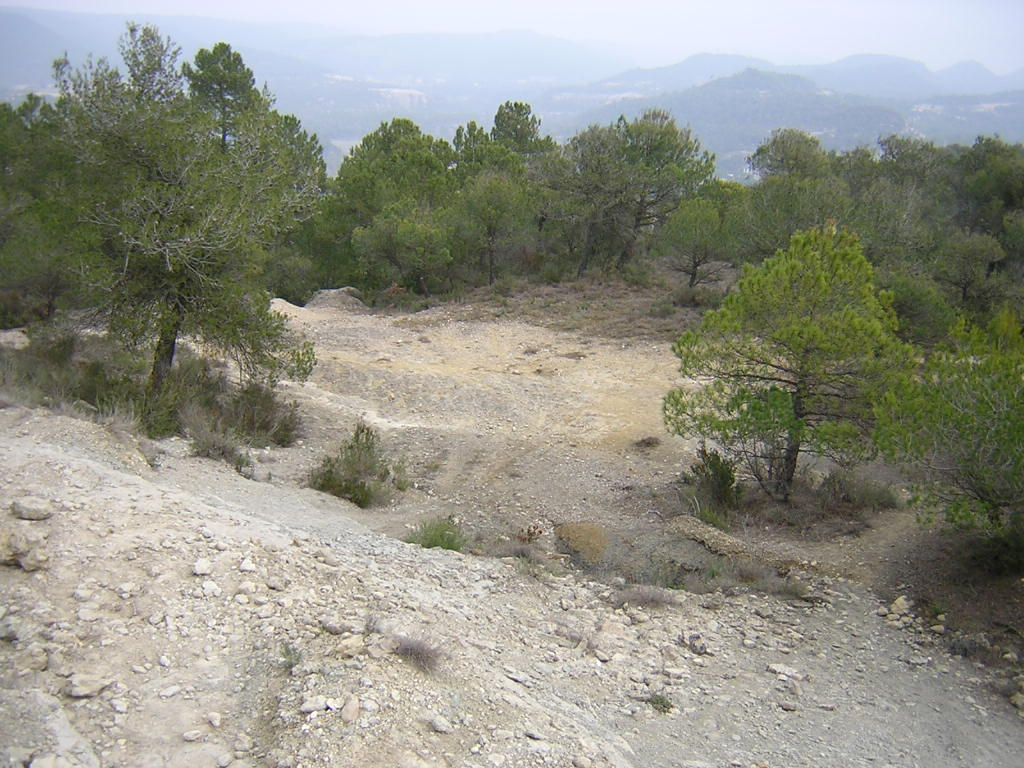 El Coll de Portella (Monistrol de Calders, Moianès)